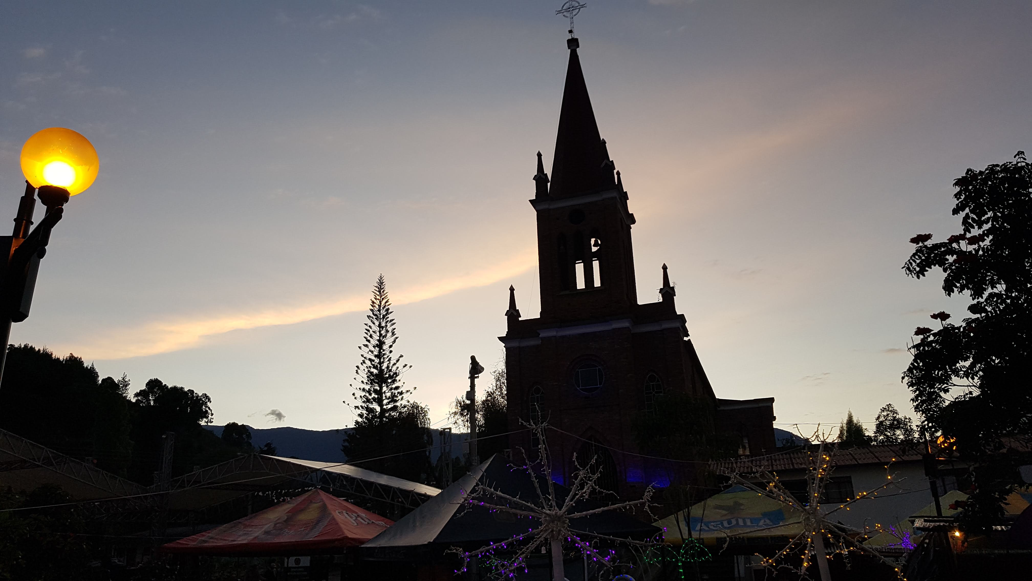 Foto del templo parroquial de Encino al amanecer.